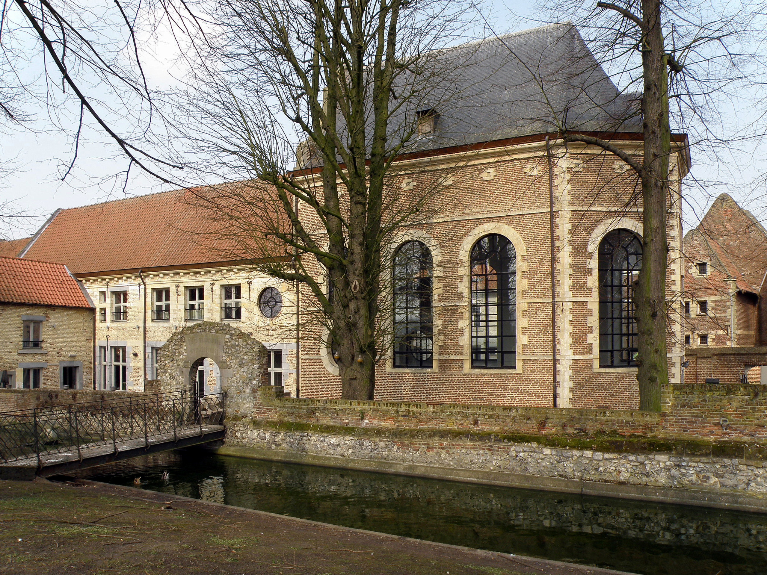 Tongres (prov. de Limbourg, Belgique). Chapelle Sainte-Ursule (en néerl. Sint-Ursulakapel) attenant à l'infirmerie (à gauche), dans le béguinage.